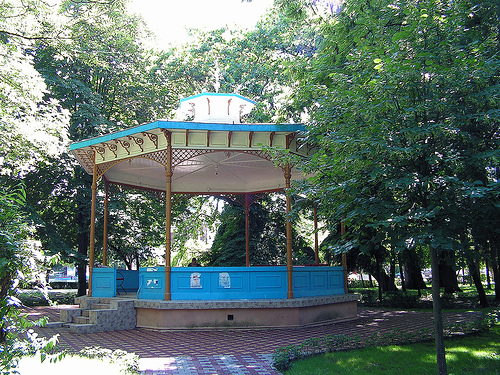 Cluj-Napoca, Pavilion în Parcul Central "Simion Bărnuţiu"